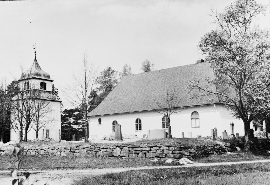 Nuvarande Älvsbacka kyrka